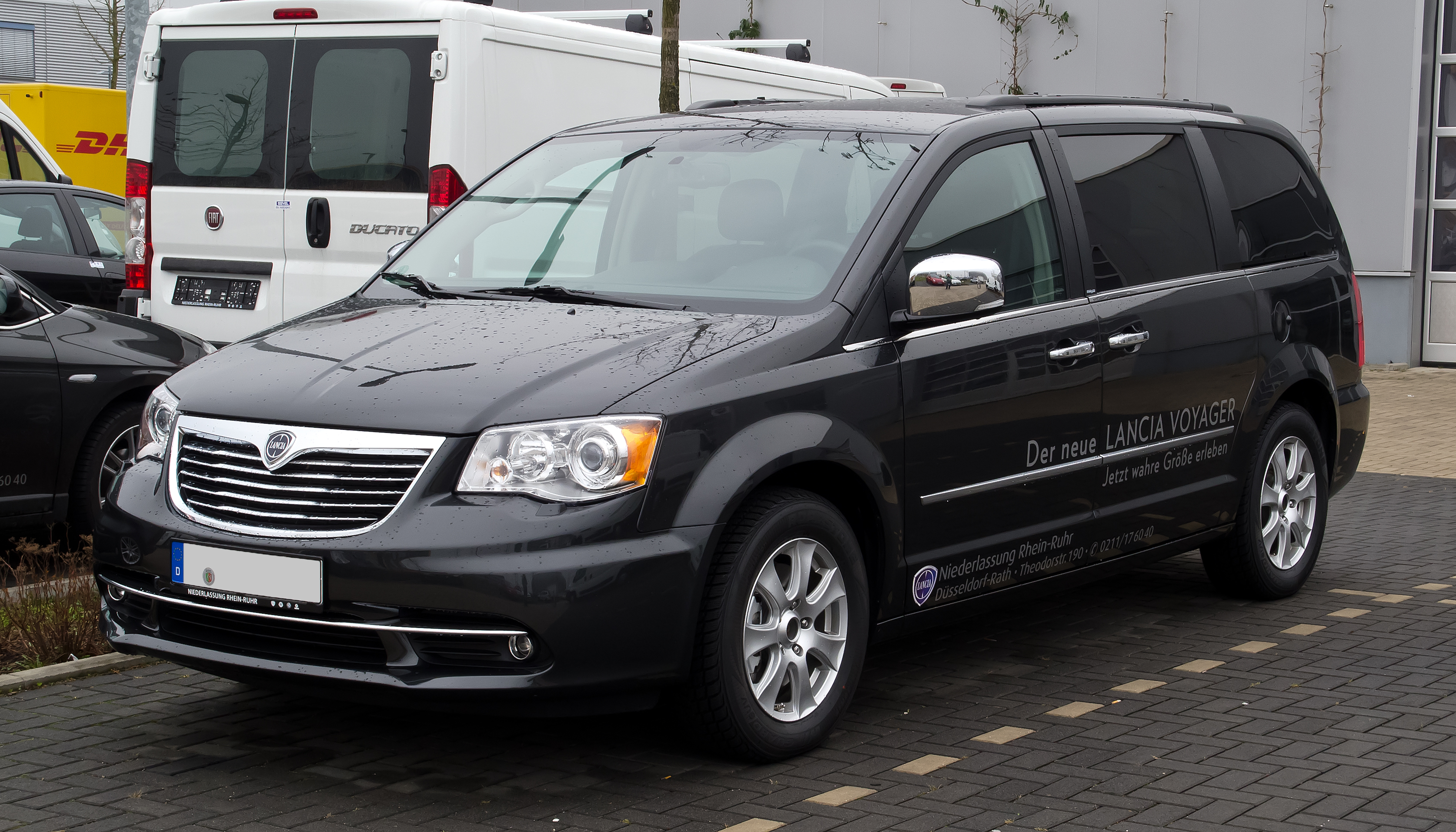 Lancia Voyager 2.8 MultiJet 16v Gold